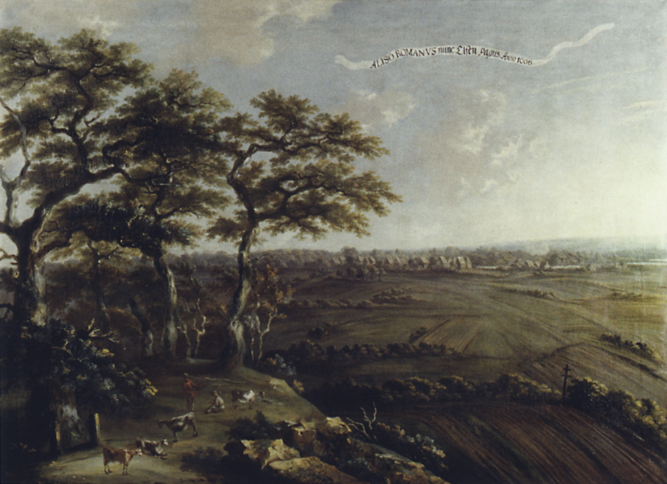 Standort Heiligenberg zwischen Elsen und Paderborn. Das Bild ist die älteste bekannte Darstellung Elsens. Bildüberschrift: „ALISO ROMANVS nunc Elsen Pagus. Anno 1666“. Das Bild wurde für Ferdinand von Fürstenbergs „Monumenta Paderbornensia“ angefertigt. Die Bildüberschrift setzt Elsen mit dem römischen Kastell Aliso gleich.